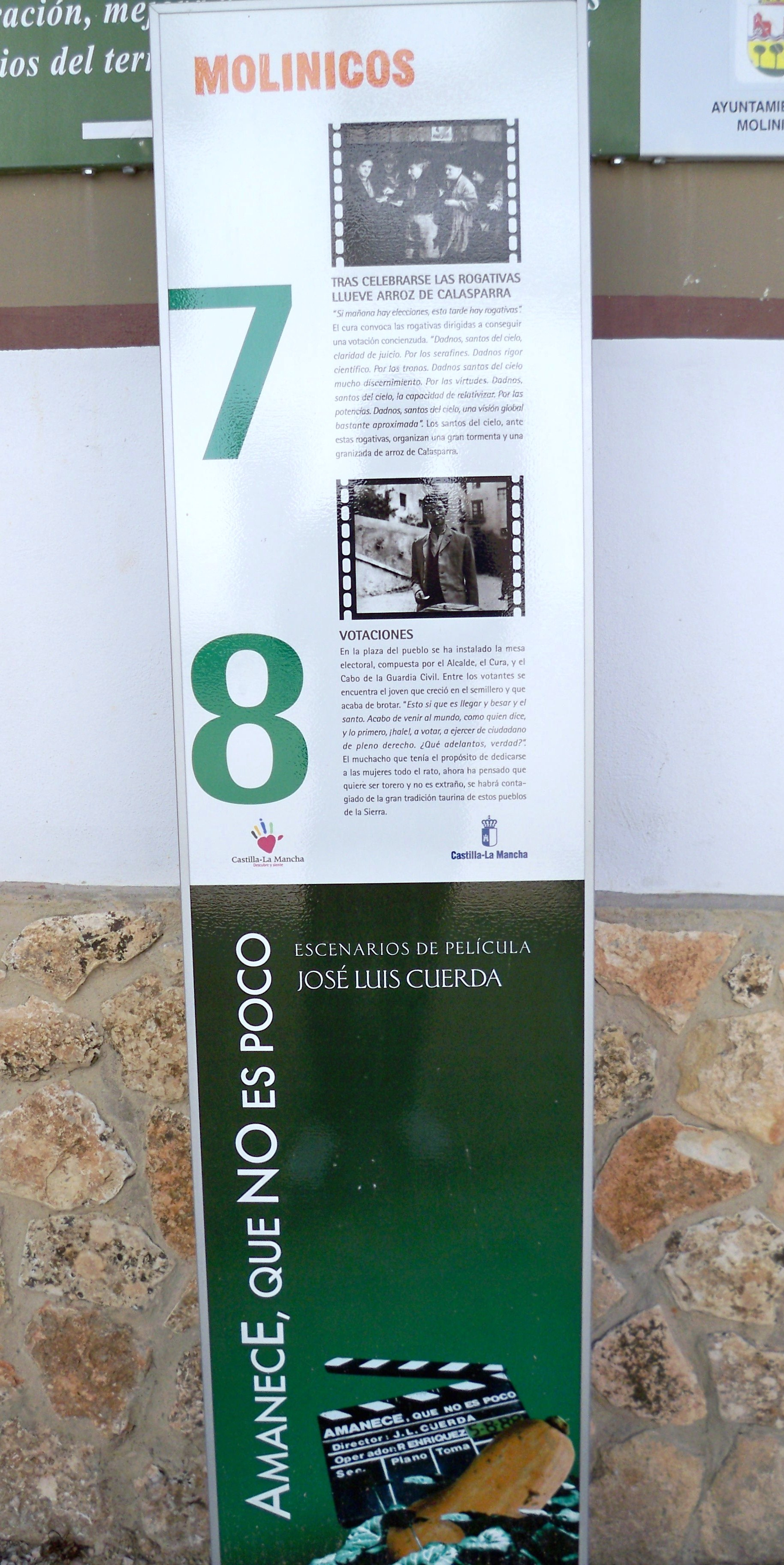 Hito indicador de dos escenas de la película "Amanece que no es poco" rodadas en la Plaza Mayor de Molinicos